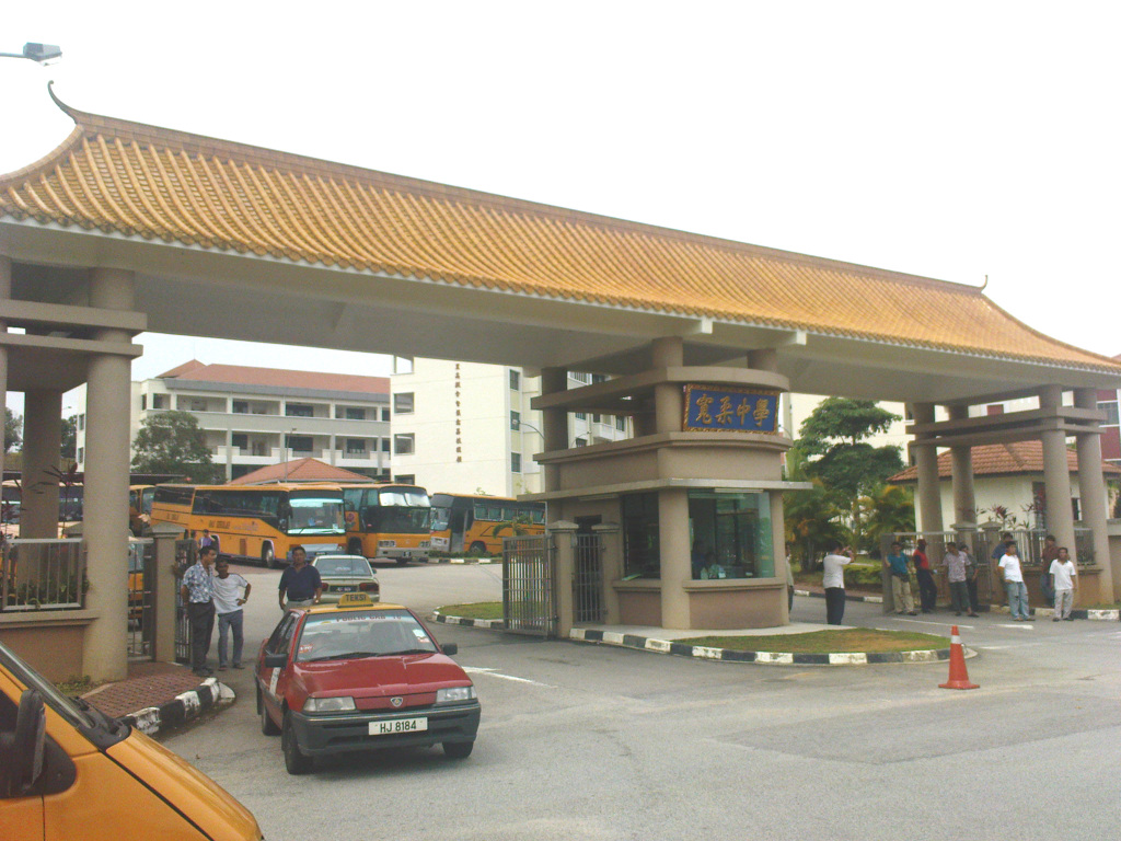 古來寬中分校